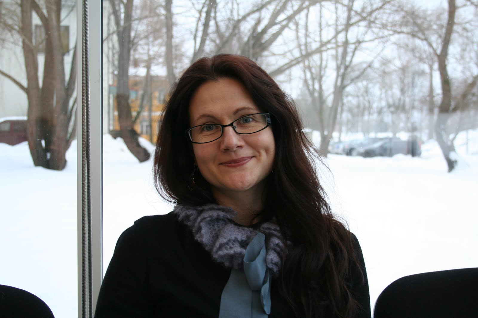 Kai Aareleid Kirjanike Liidu korraldatud Kulka kirjanduse sihtkapitali aastaauhinna nominendide tutvustusesinemisel Pärnus.